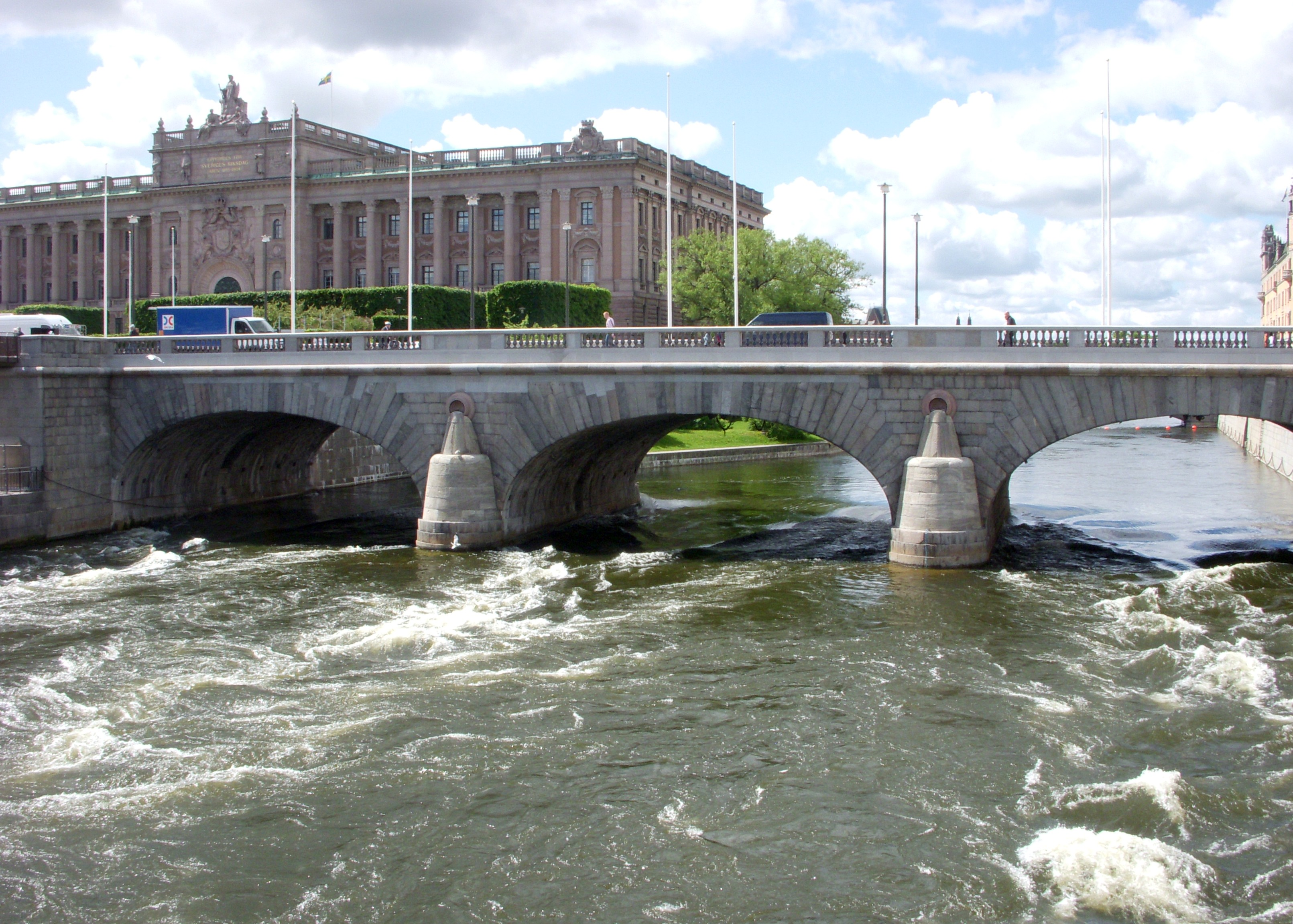 Norrström och Norrbro i Stockholm